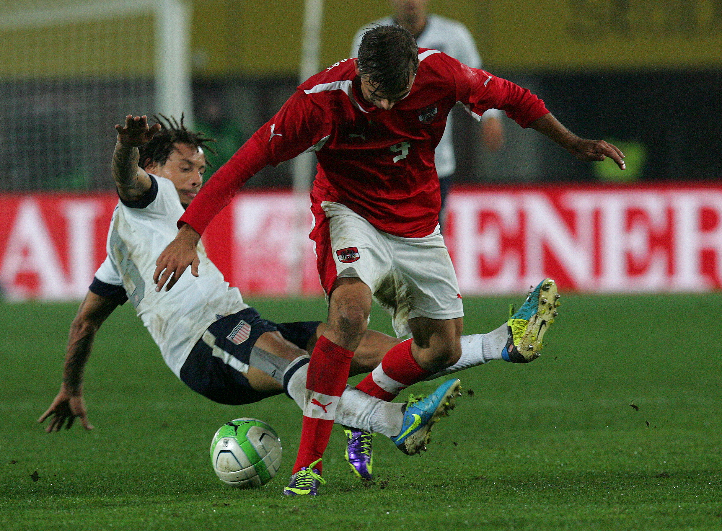 Freundschaftliches Länderspiel Österreich - USA 19.11.2013 in Wien: Lukas Hinterseer, Jermaine Jones